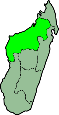 Mahajanga, province of Madagascar